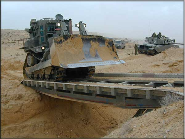 דחפור D9 של גדוד הנדסה - 710